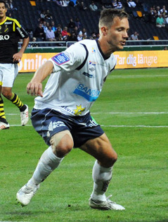 Anders Wikström